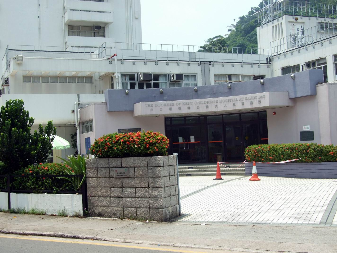 大口環根德公爵夫人兒童醫院